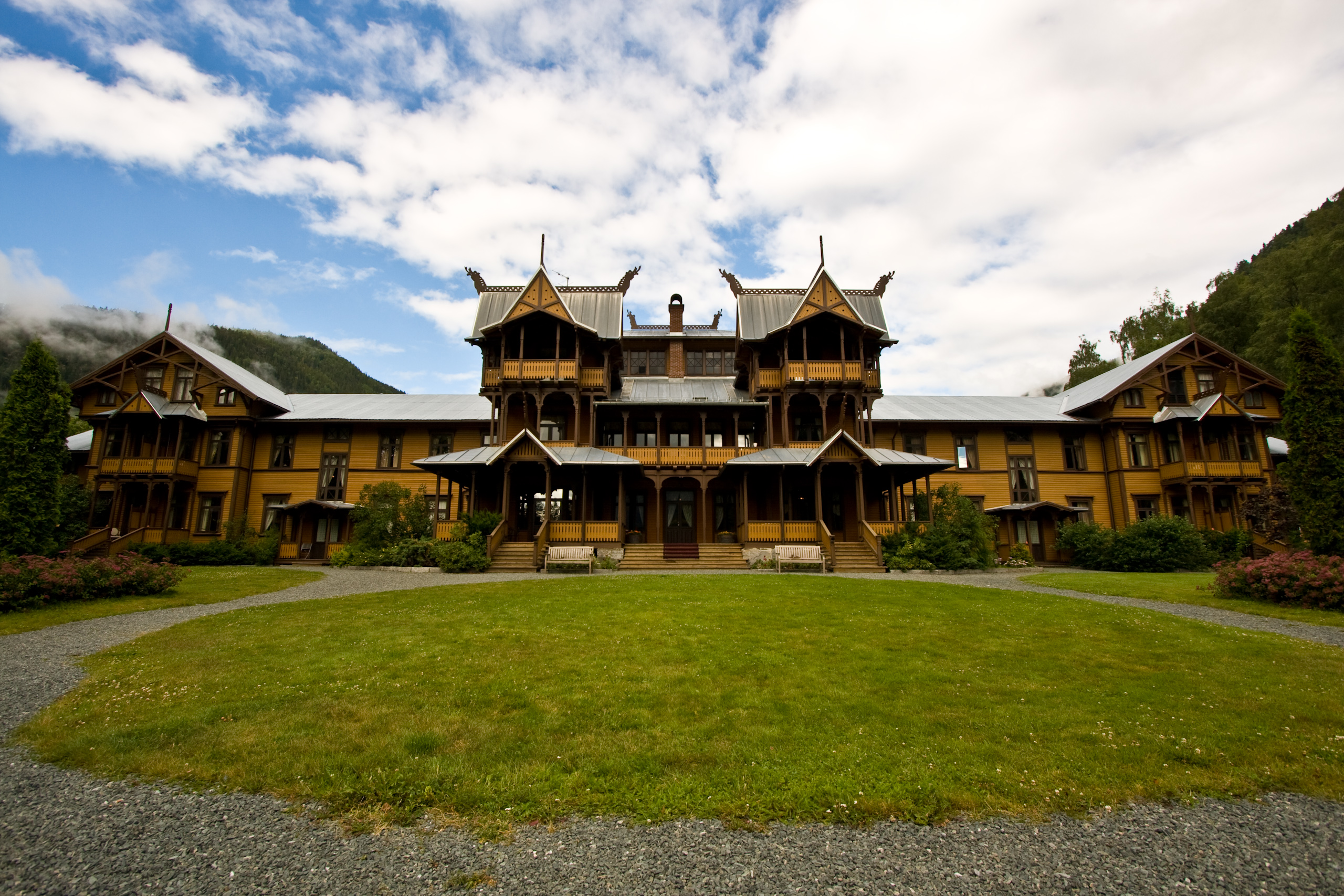 Dalen Hotel i Dalen i Tokke kommune i Telemark fylke